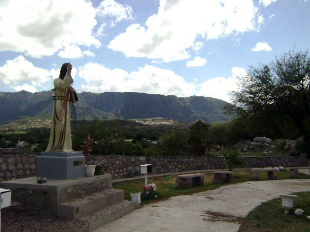 Plazoleta de la Misericordia, en Olta, La Rioja, Argentina